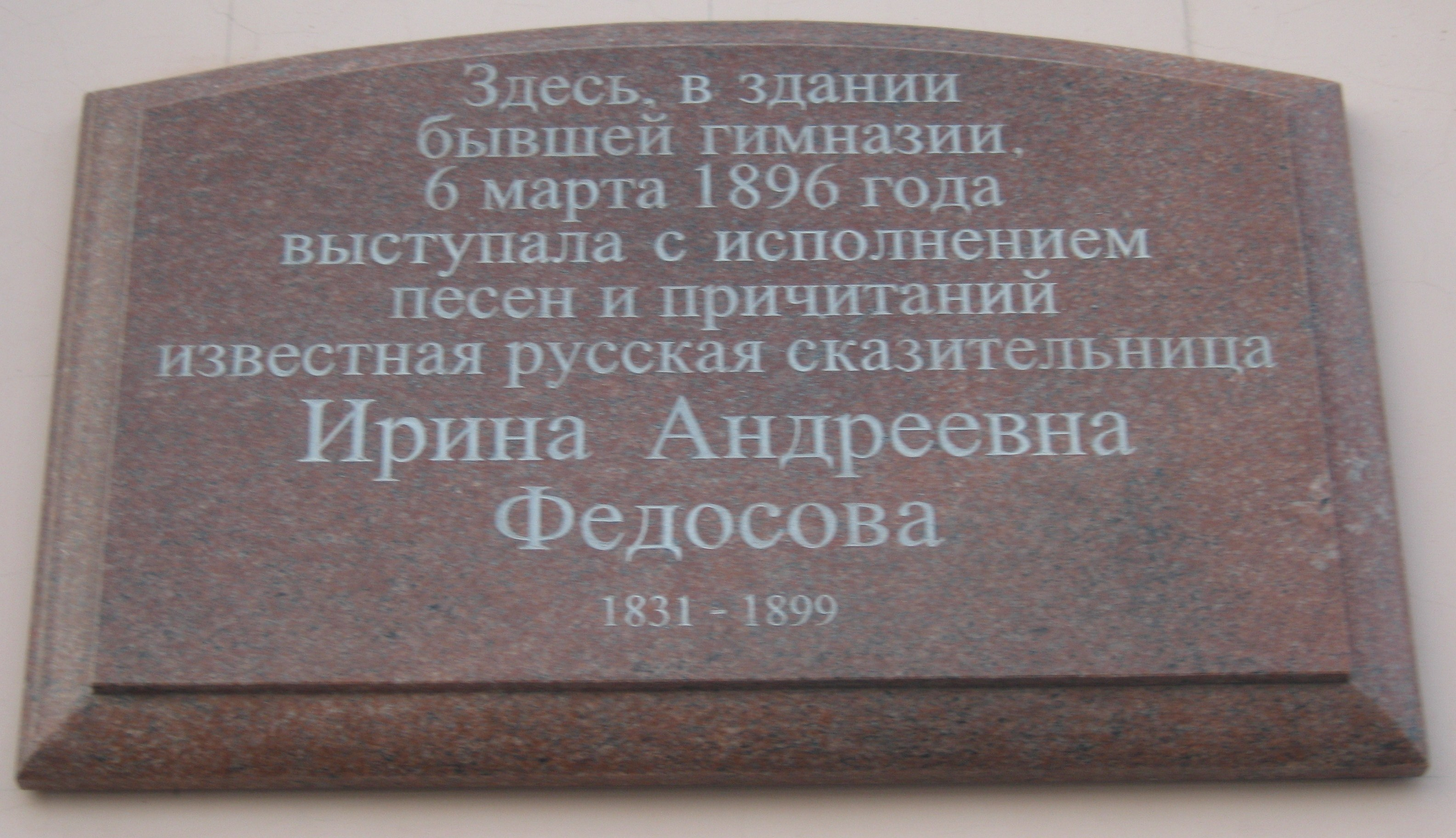 Мемориальная доска в Петрозаводске